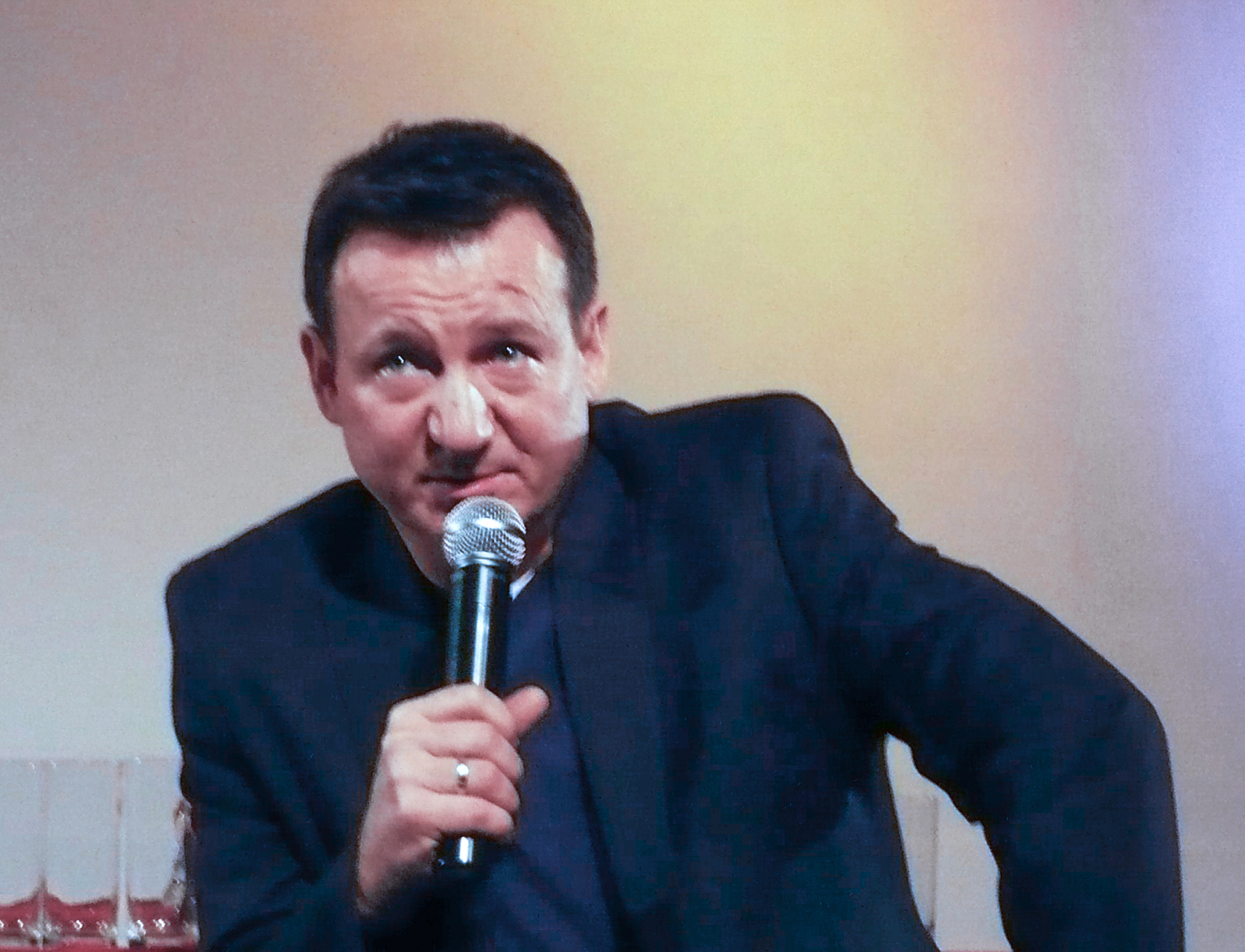 Robert Więckiewicz w Nowej Rudzie